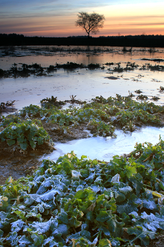 Okolice Pałówka-1212